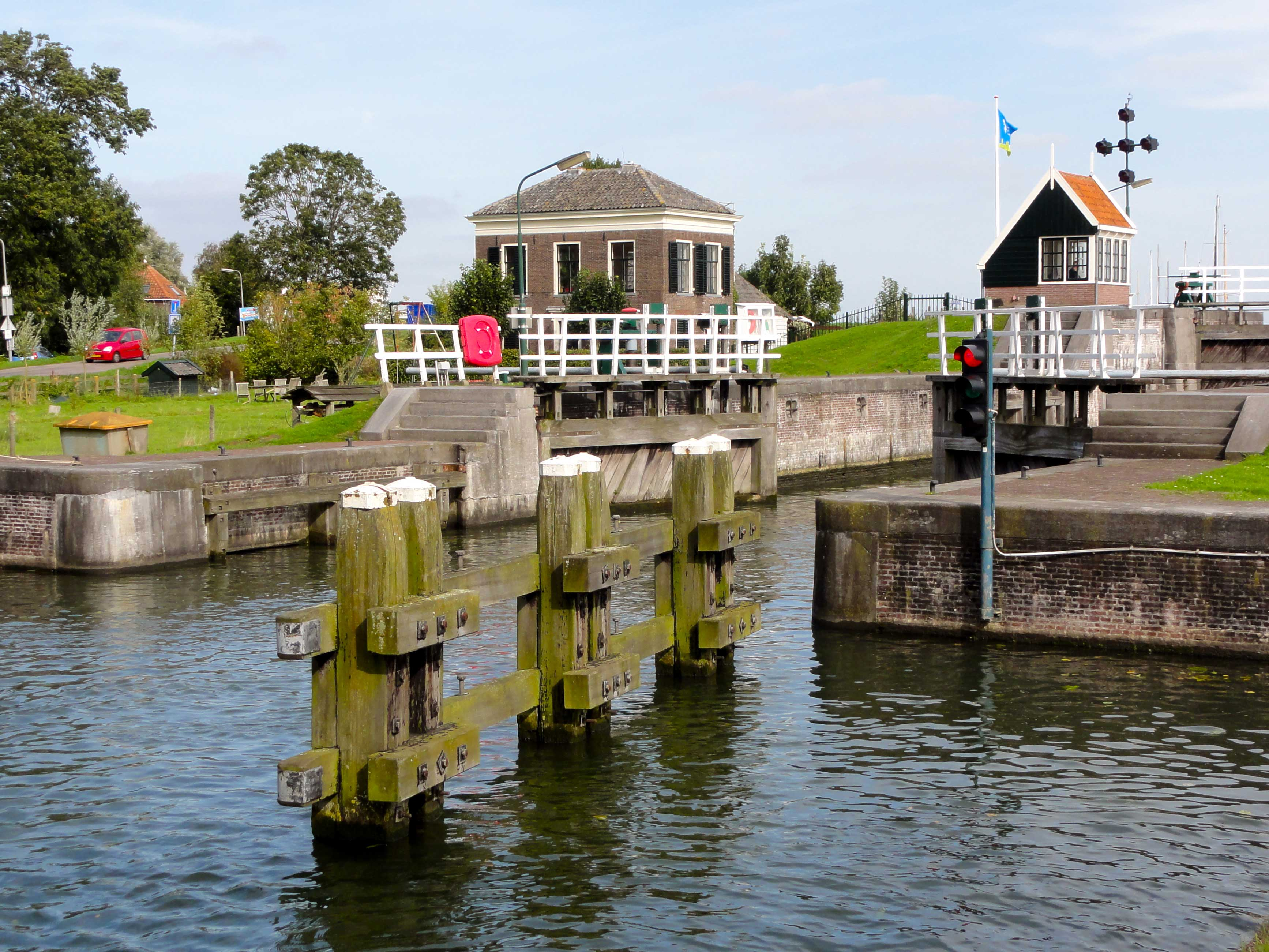 Edammersluis